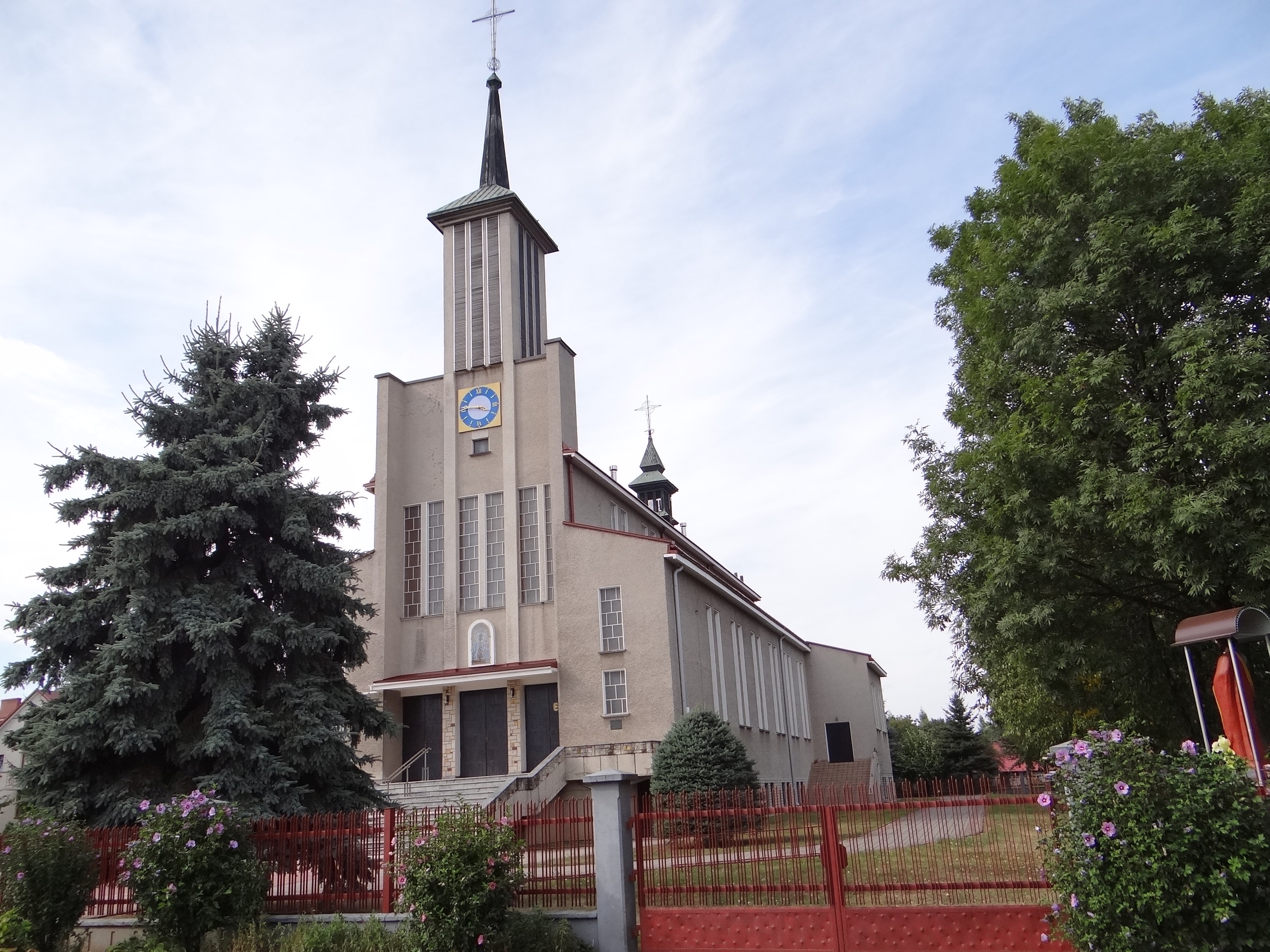 Biskupice Radłowskie 274 - rzymskokatolicki kościół parafialny p.w. MB Częstochowskiej